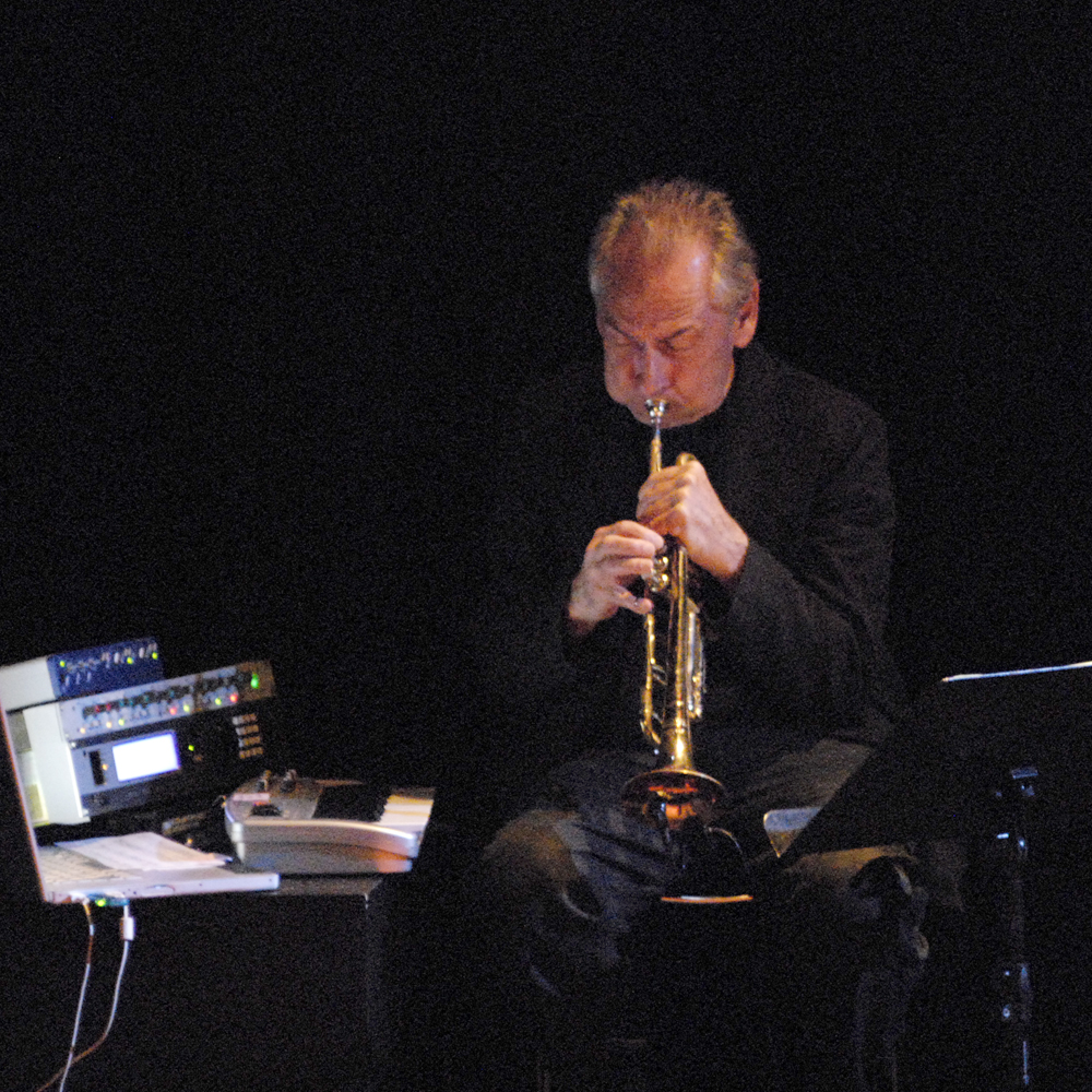 Jon Hassell performing at Stockholm JazzFest09